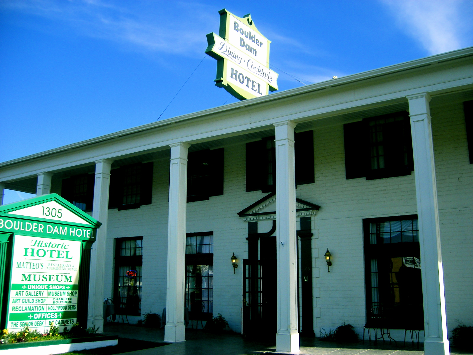 Boulder Dam Hotel In Boulder City, Nevada